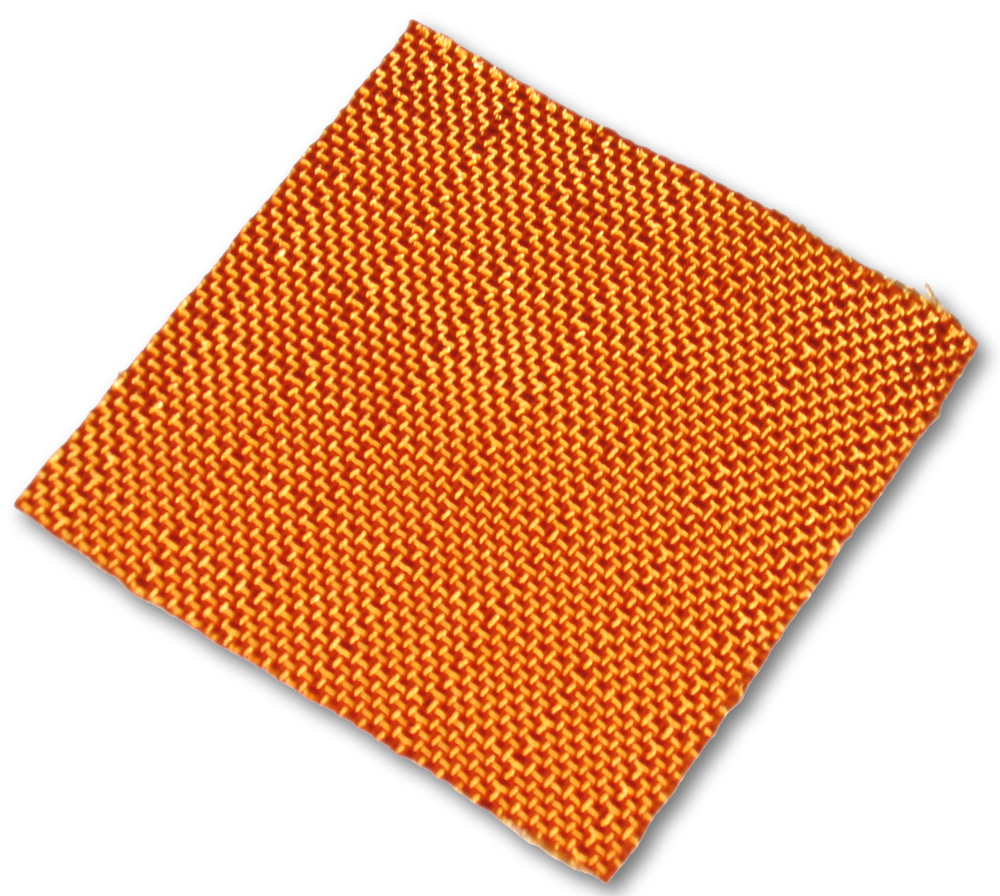 Titel: Stoffmuster vom Projekt "The Gates"